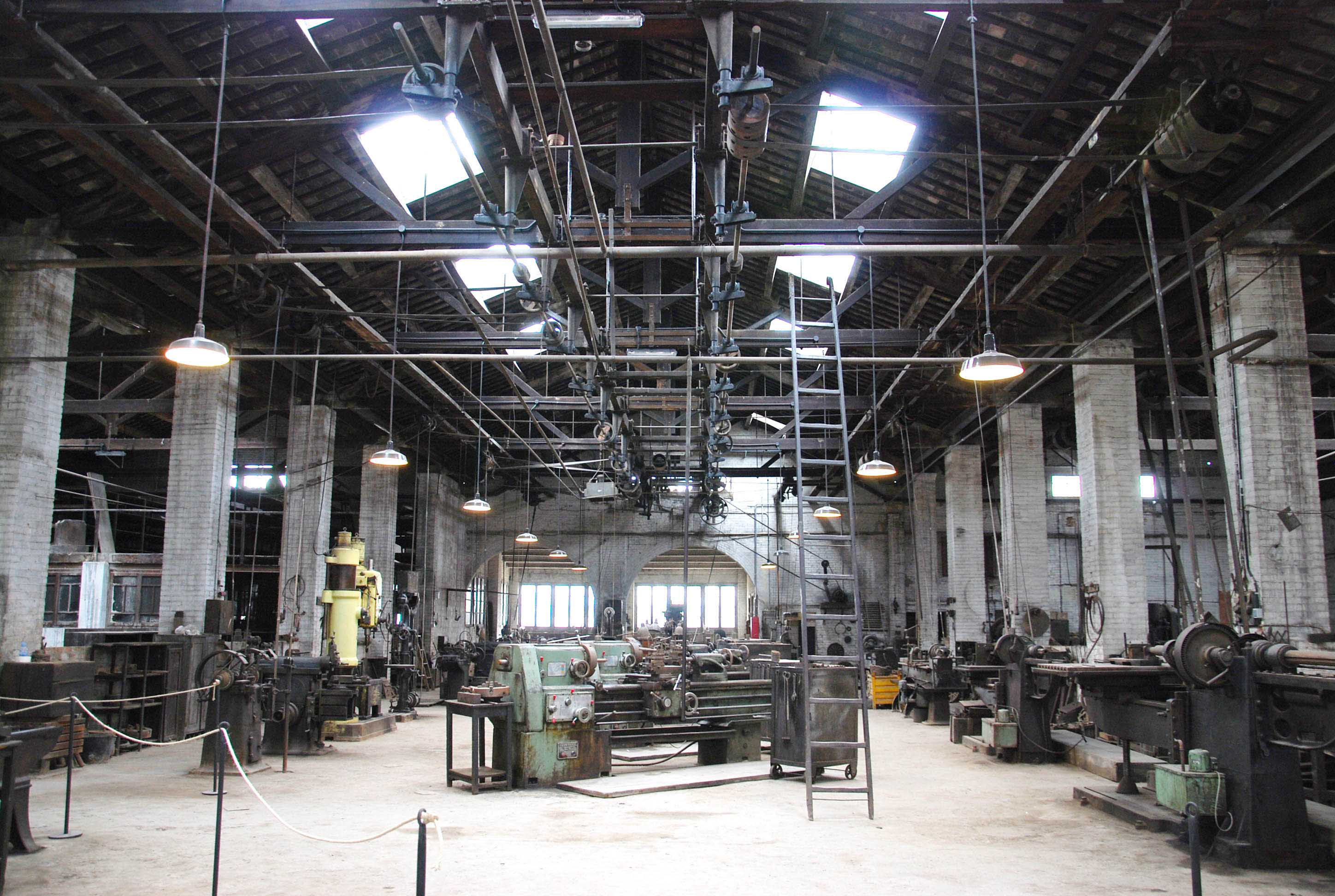 Embarrat de la secció de tallers, nau 5. Aquest embarrat és un dels sis que es conserven a la fàbrica